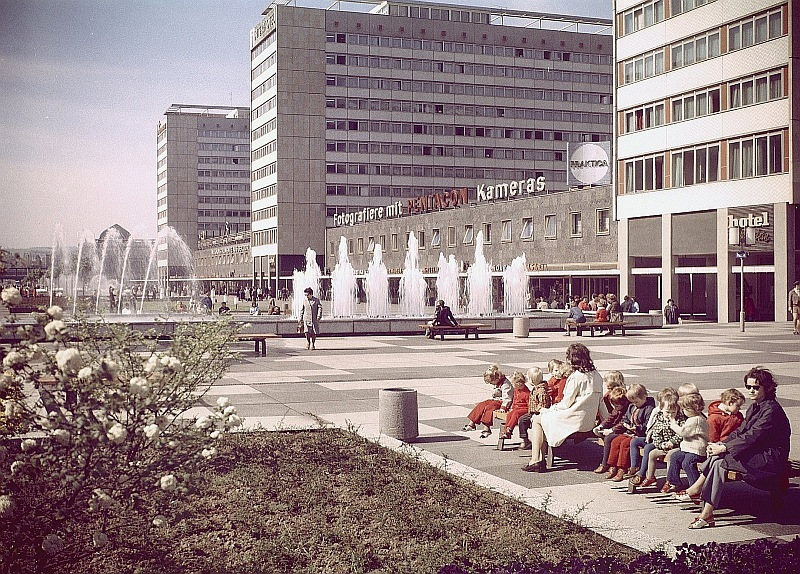 Original image description from the Deutsche Fotothek Dresden. Blick entlang der Prager Straße Richtung Hauptbahnhof